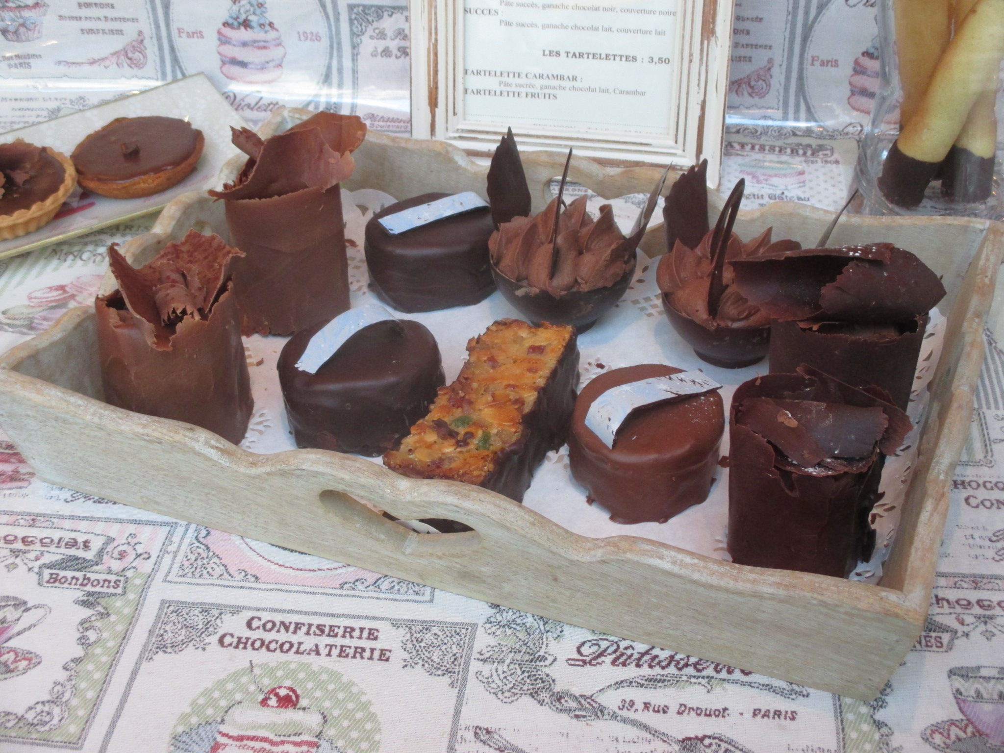 Chocolats